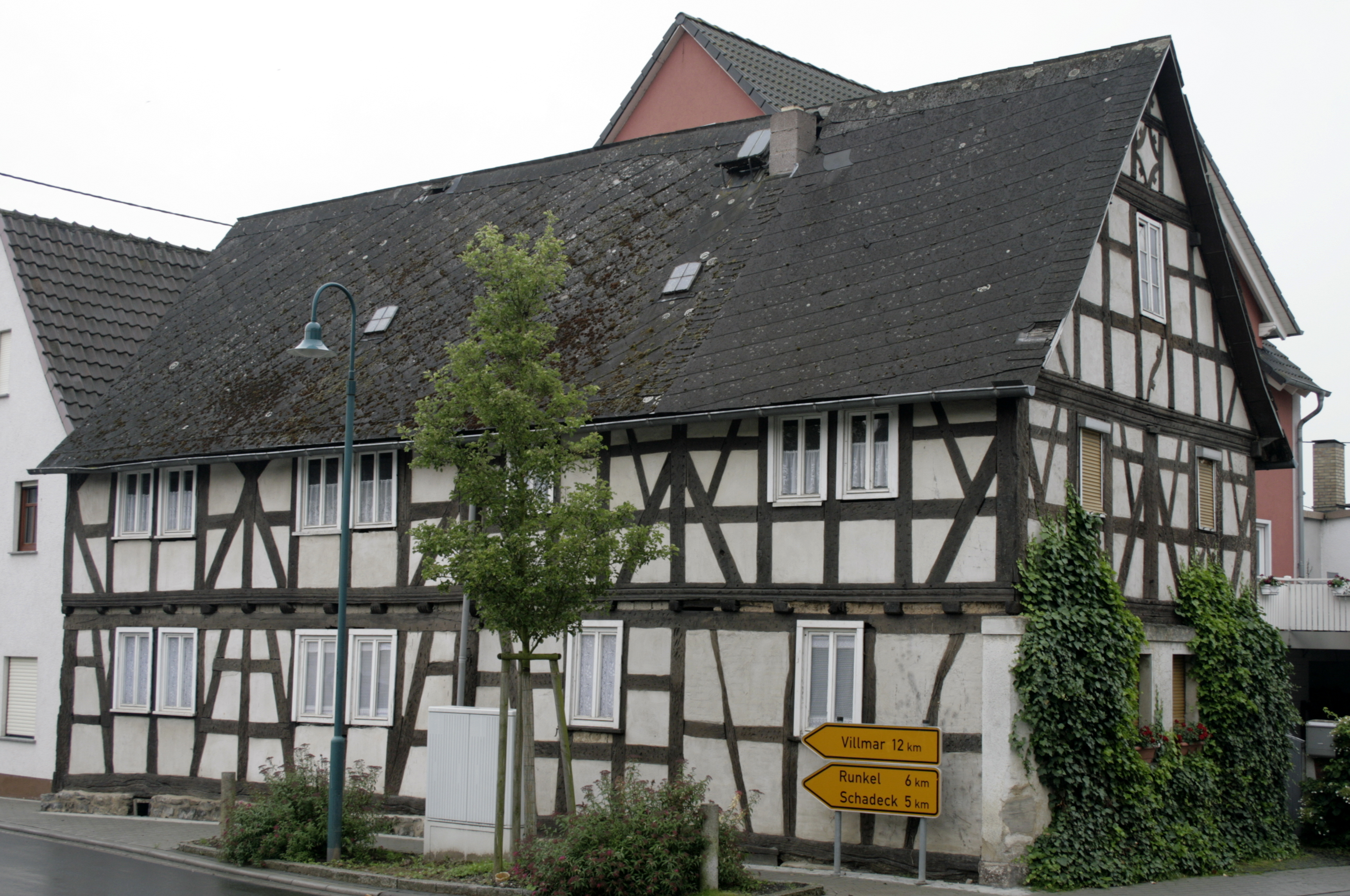 Ältestes Haus in Niedertiefenbach, Deutschland